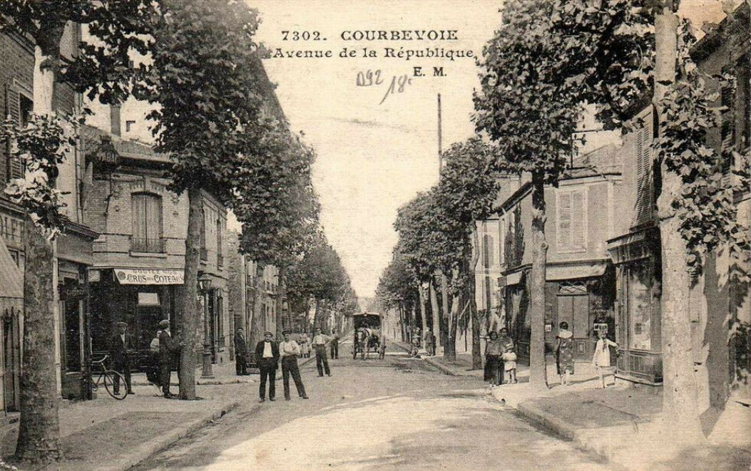 Courbevoie.Avenue de la République.Fiacre